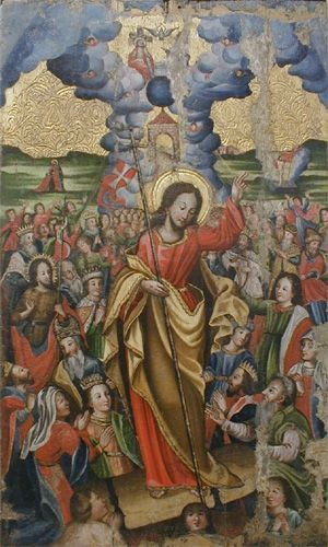 Уваскрэсенне – Сыходжанне ў пекла. Канец XVII ст. З Дзісны Віцебскай вобл. Нацыянальны мастацкі музей